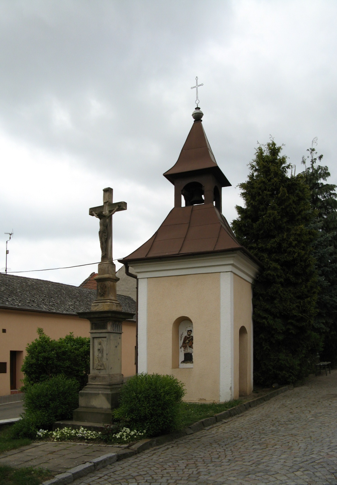 Zvonice (Ondratice), náves, Ondratice